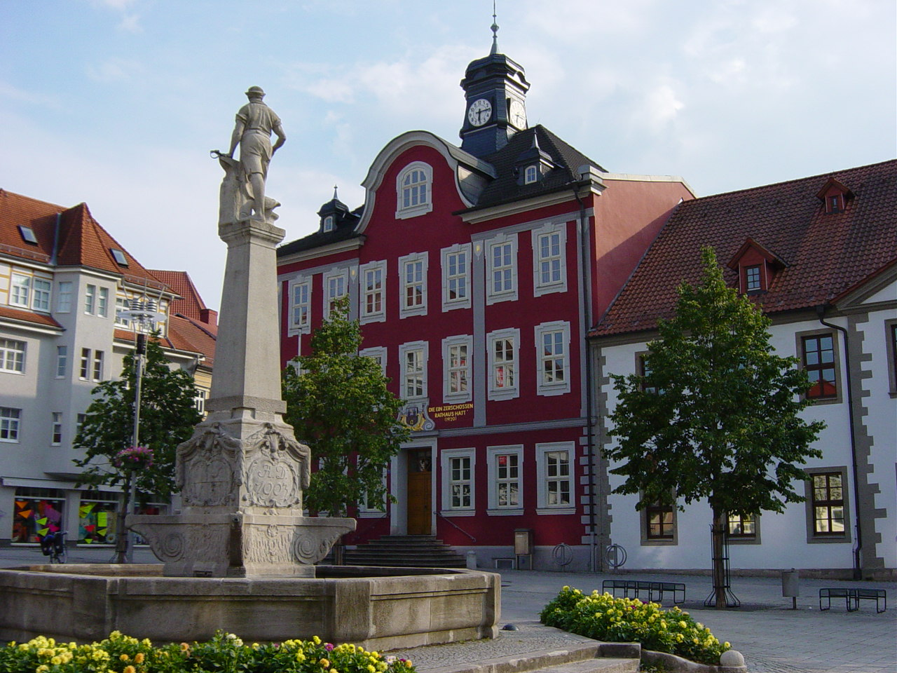 Das Rathaus von Suhl in Thüringen mit Waffenschmied-Denkmal im Vordergrund